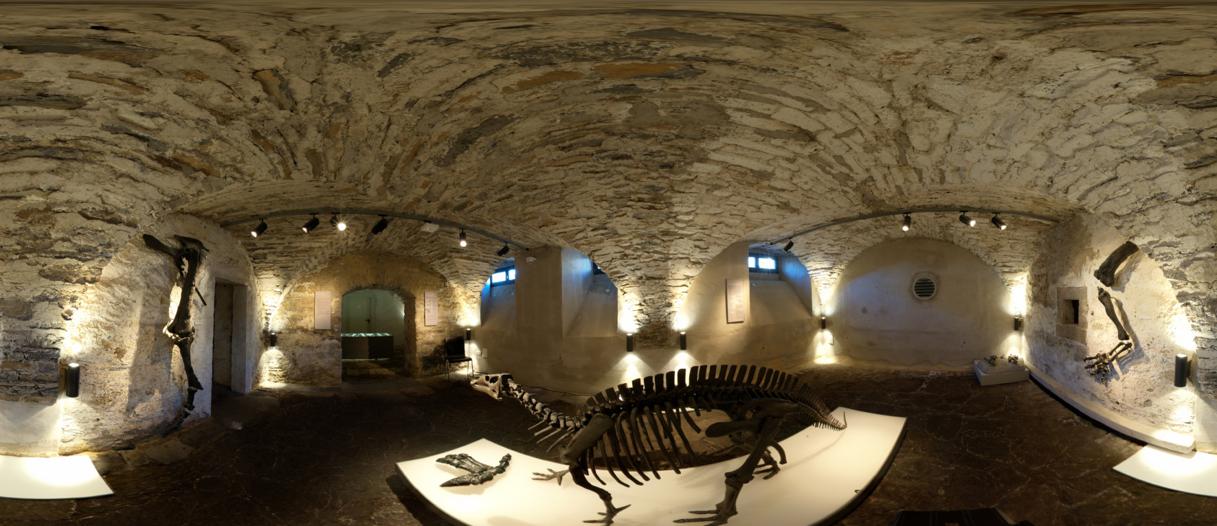 Ausstellungen im Museum Haus Hövener Museum Haus Hövener Native nameMuseum Haus Hövener LocationBrilon , GermanyCoordinates51° 23′ 44.16″ N, 8° 34′ 05.52″ E Established1983 Web page Authority control : Q1667289 VIAF: 201846718 GND: 7762529-8 institution QS:P195,Q1667289